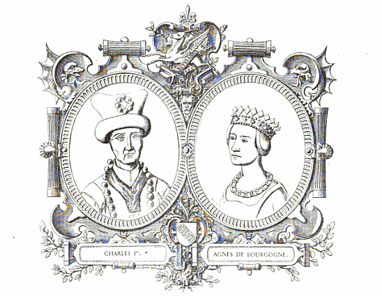 Karel I. Bourbonský s chotí Anežkou